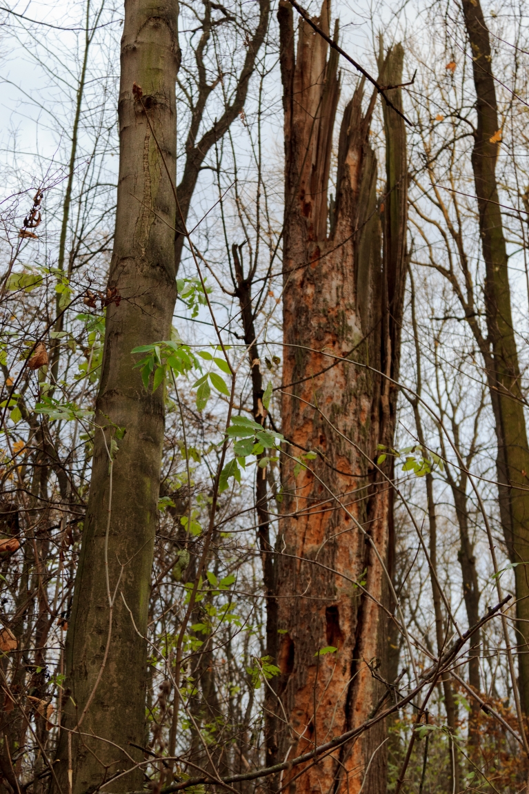 Odumřelý strom v PP Bažantnice v Satalicích